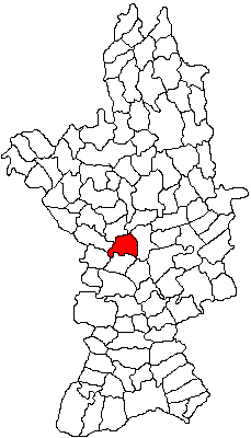 Categorie:Hărţi ale judeţului Olt